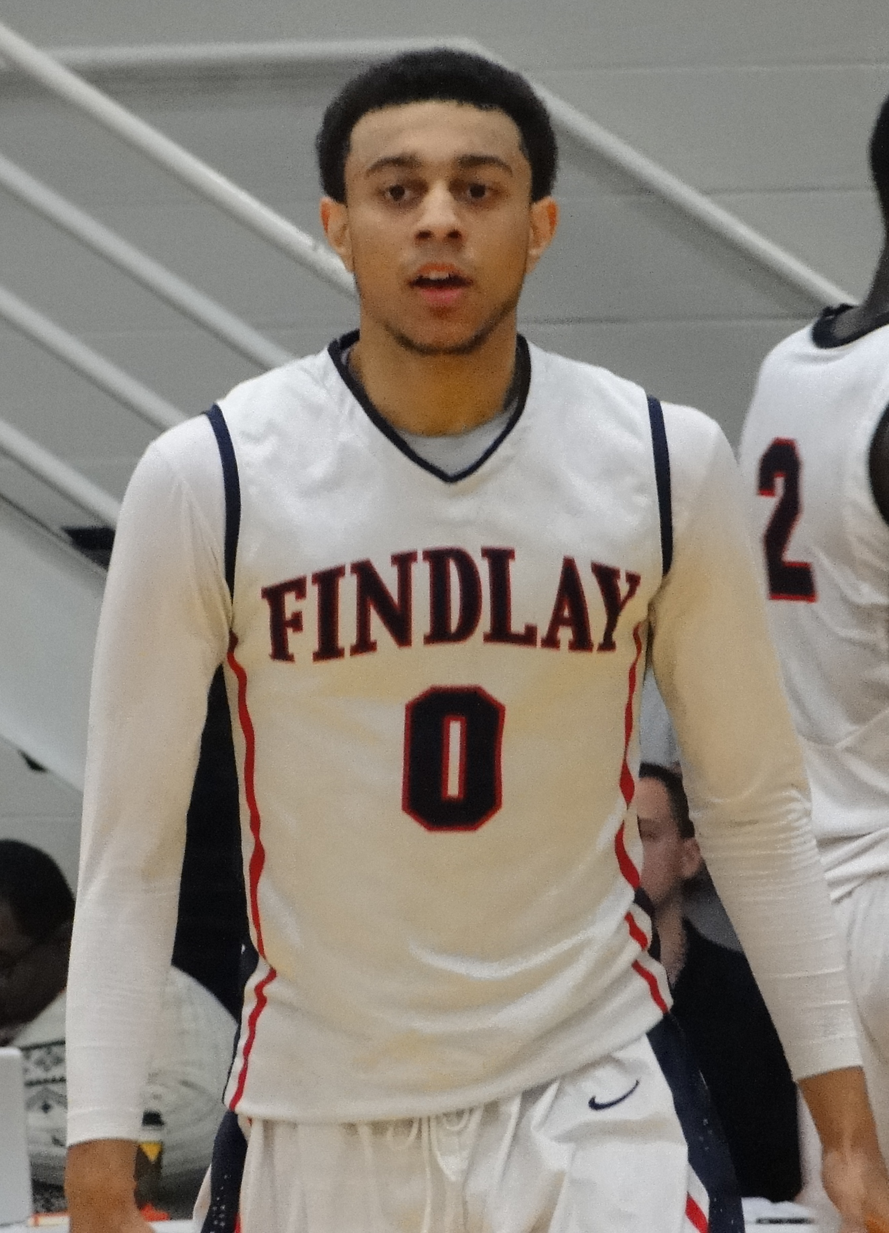 Nigel Williams-Goss